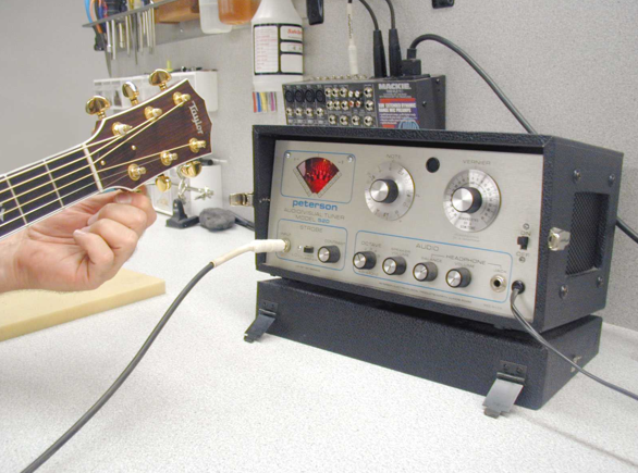 Peterson Model 420 Strobe Tuner